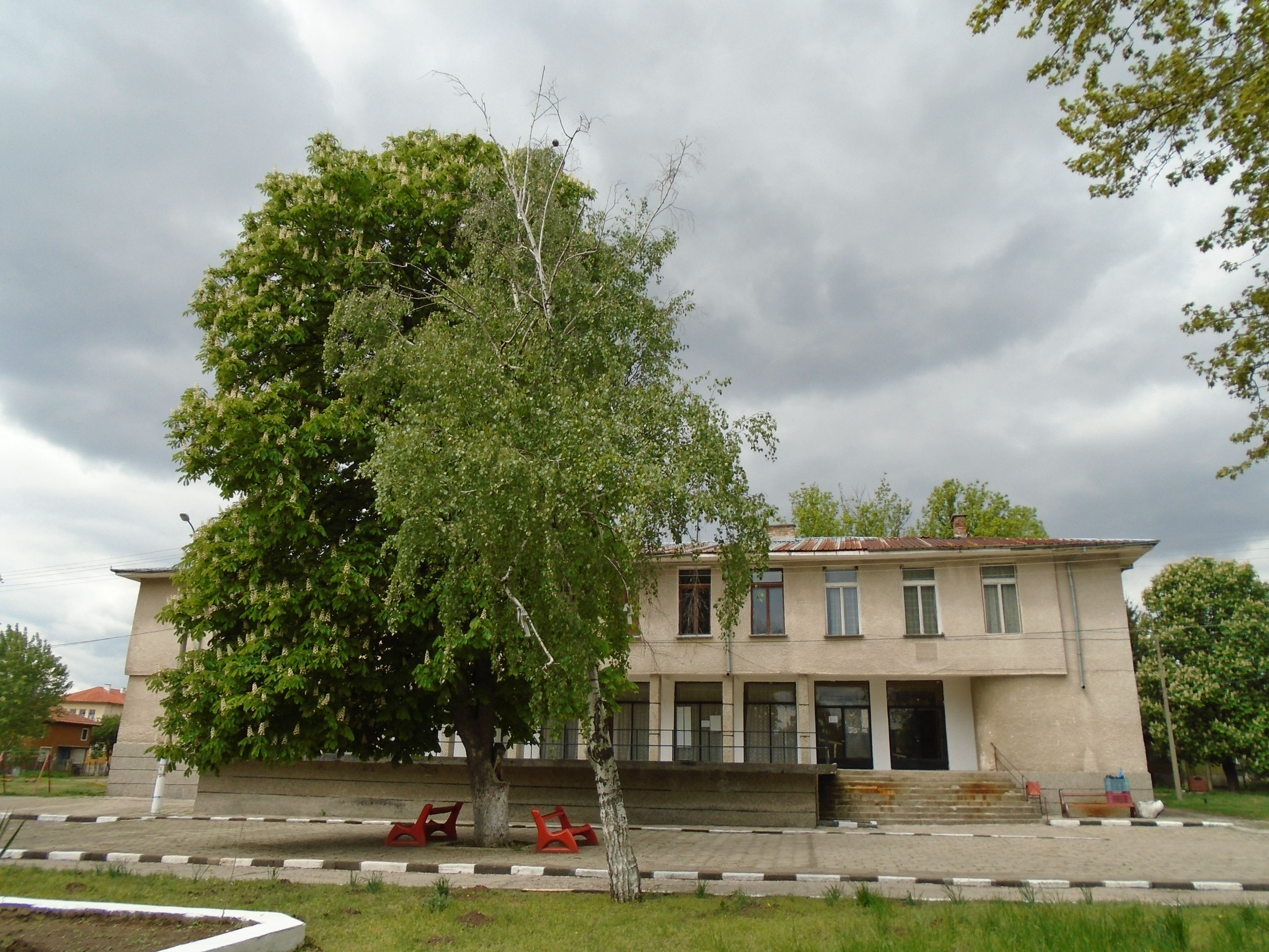 Народно читалище "Светлина - 1928" село Неговановци